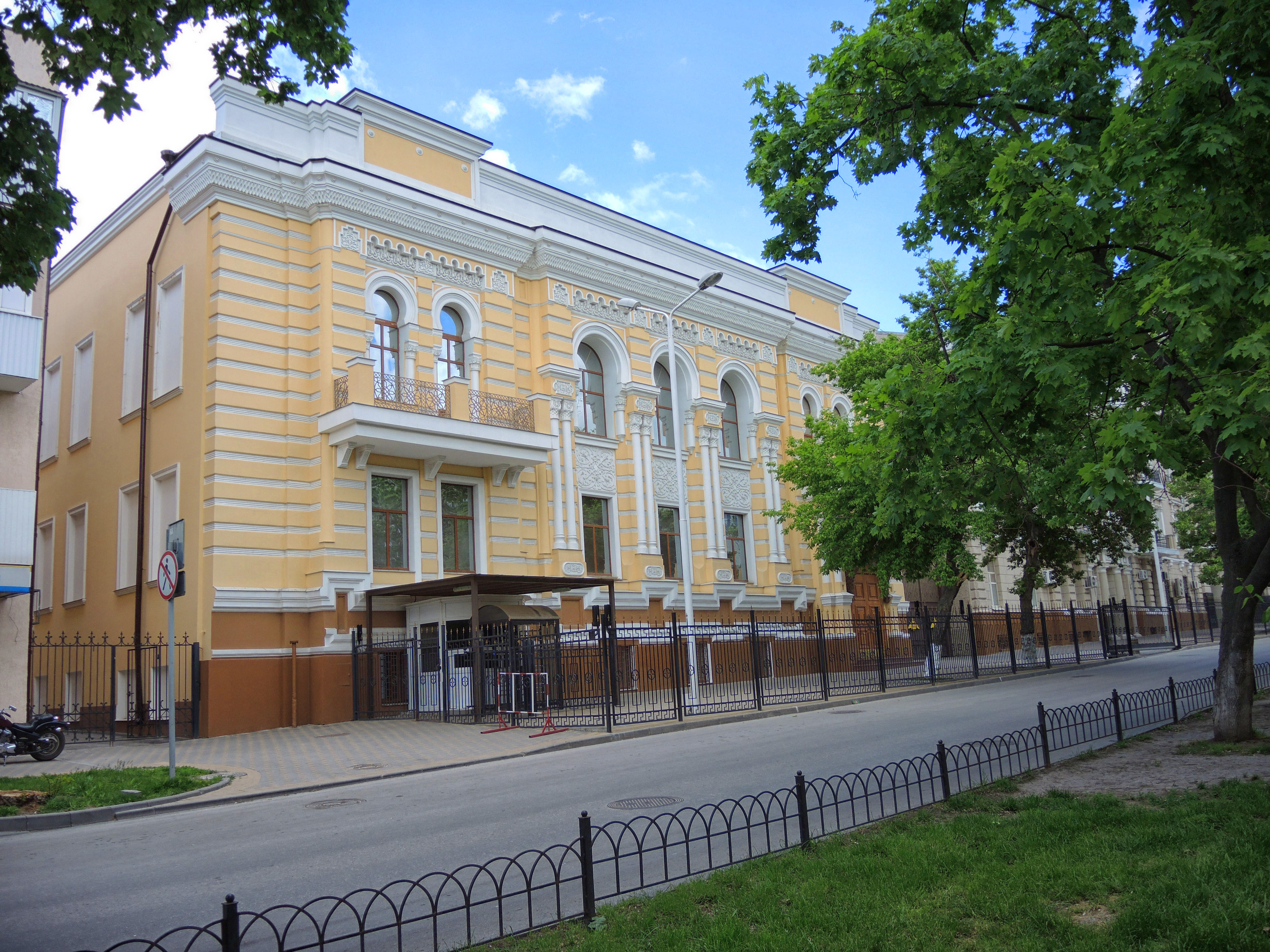 Доходный дом В.С. Кушнарева: улица Пушкинская, 51, Ростов-на-Дону, Ростовская область